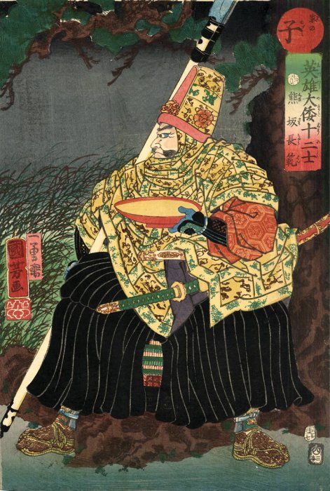 Kumasaka Chôhan in monk’s robes